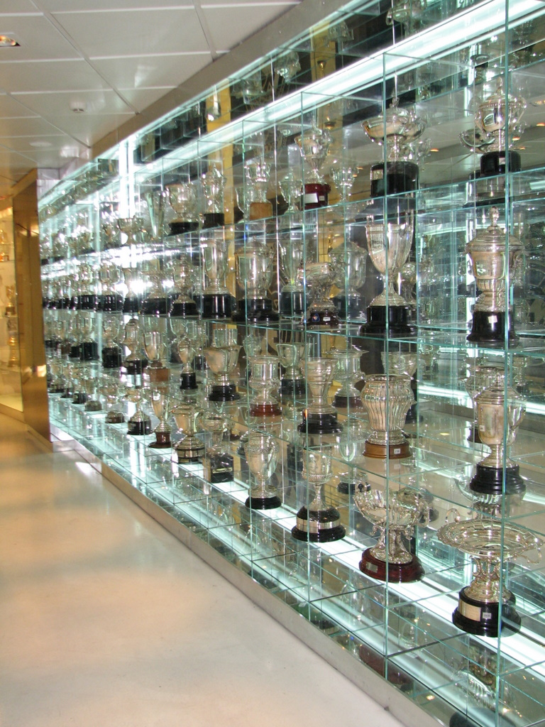 las copas(Real Madrid)